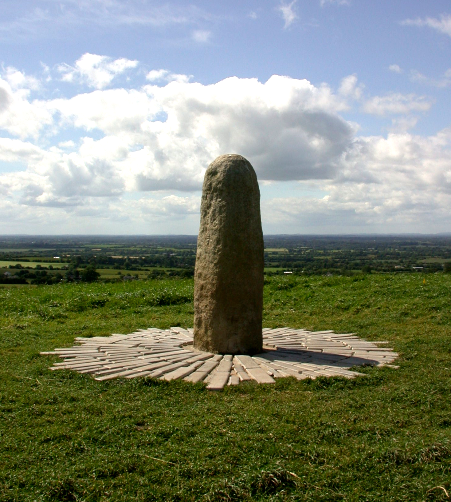 Tara. Irlanda.